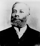 Elijah J. McCoy, from